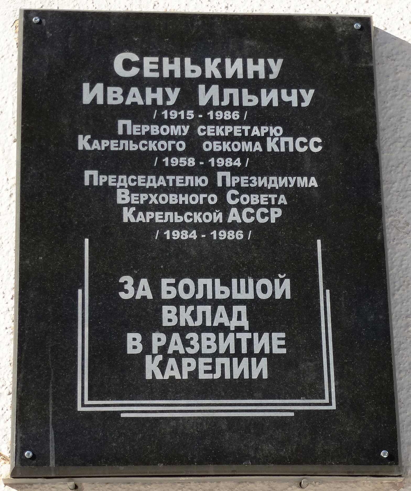 Мемориальная доска Сенькину И.И. в Петрозаводске на ул.Свердлова,д.10